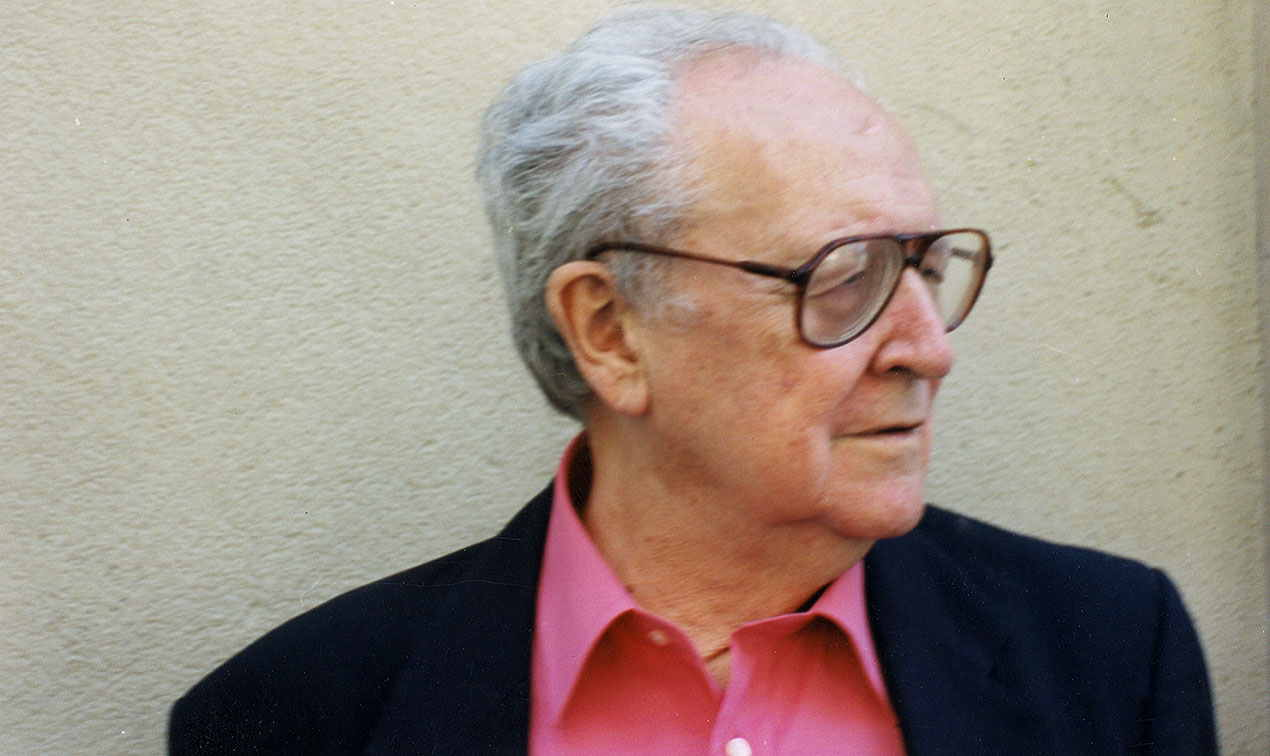 Ignacio Hernando de Larramendi y Montiano